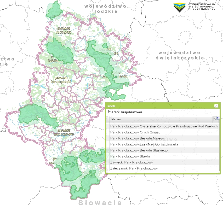 Parki krajobrazowe w woj. śląskim z RDOŚ Katowice